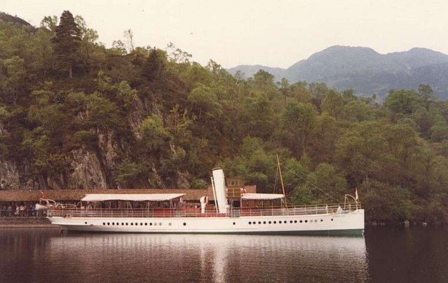 Sir Walter Scott at Trossachs Pier